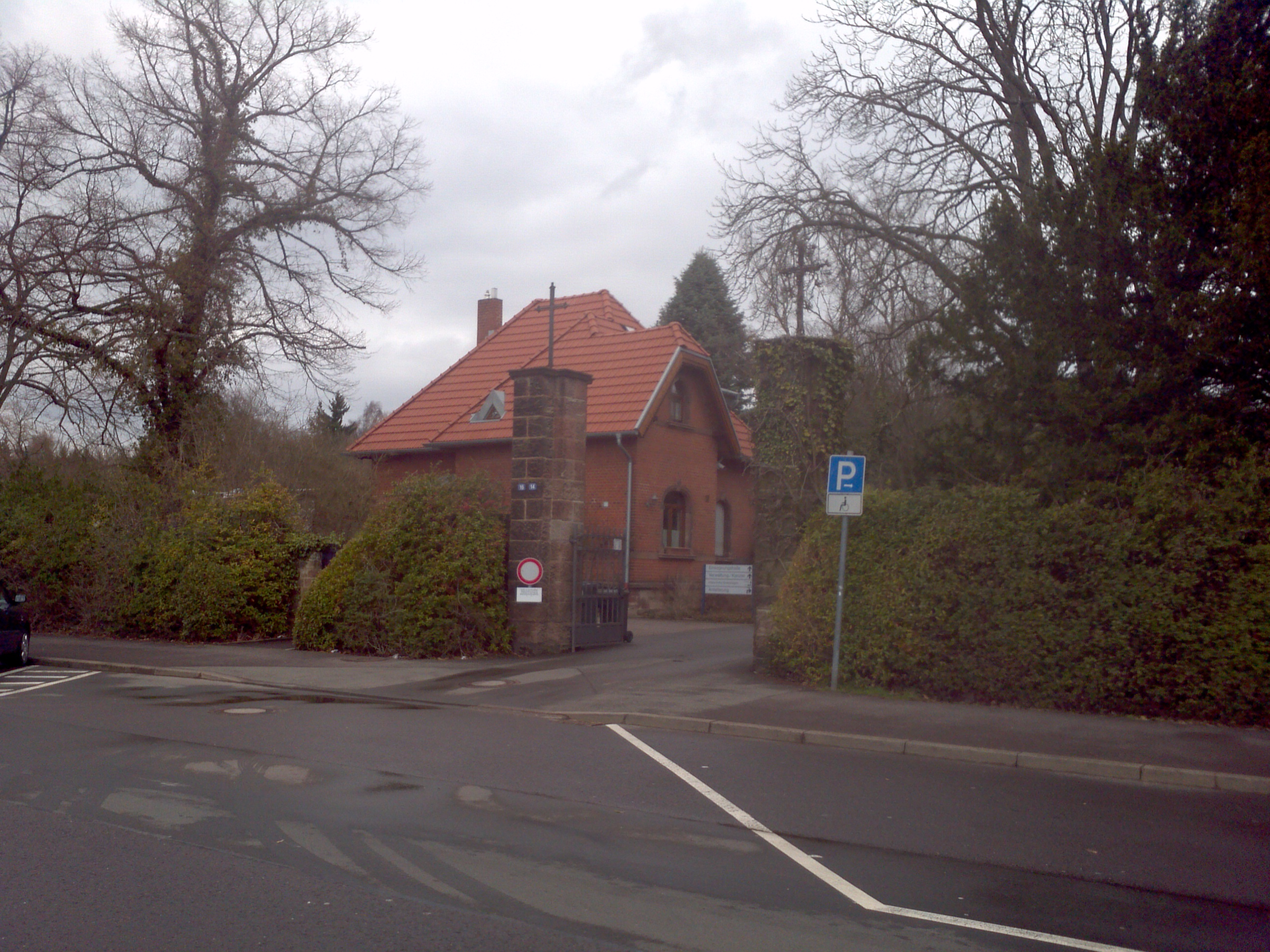 Gärtnerhaus Waldfriedhof Burbach, Viktor-Tesch-Allee